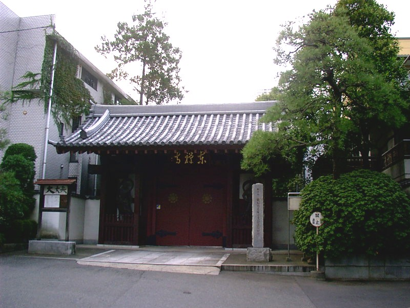 Tōzenji(東禅寺) of Tokyo, Japan